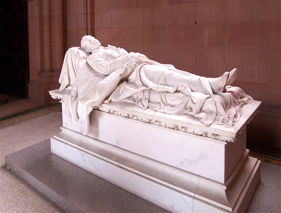 Anlässlich des Tags des offenen Denkmals konnte man die sonst nicht offen zugängliche fürstliche Grabkapelle in Karlsruhe besichtigen. In der großen Halle finden sich drei prachtvolle Grabmäler aus weißem Carrara-Marmor mit lebensgroßen Figuren von Großherzog Friedrich I., seiner Gemahlin Prinzessin Luise von Preußen und ihrem Sohn Prinz Ludwig Wilhelm (Bild). Professor Hermann Volz schuf diese Kunstwerke so täuschend ähnlich, dass man glaubt Lebende vor sich zu haben. Der Prinz ist in Kleiner Uniform (Überrock) des 1. Badischen Leib-Grenadier-Regiments Nr. 109 dargestellt.